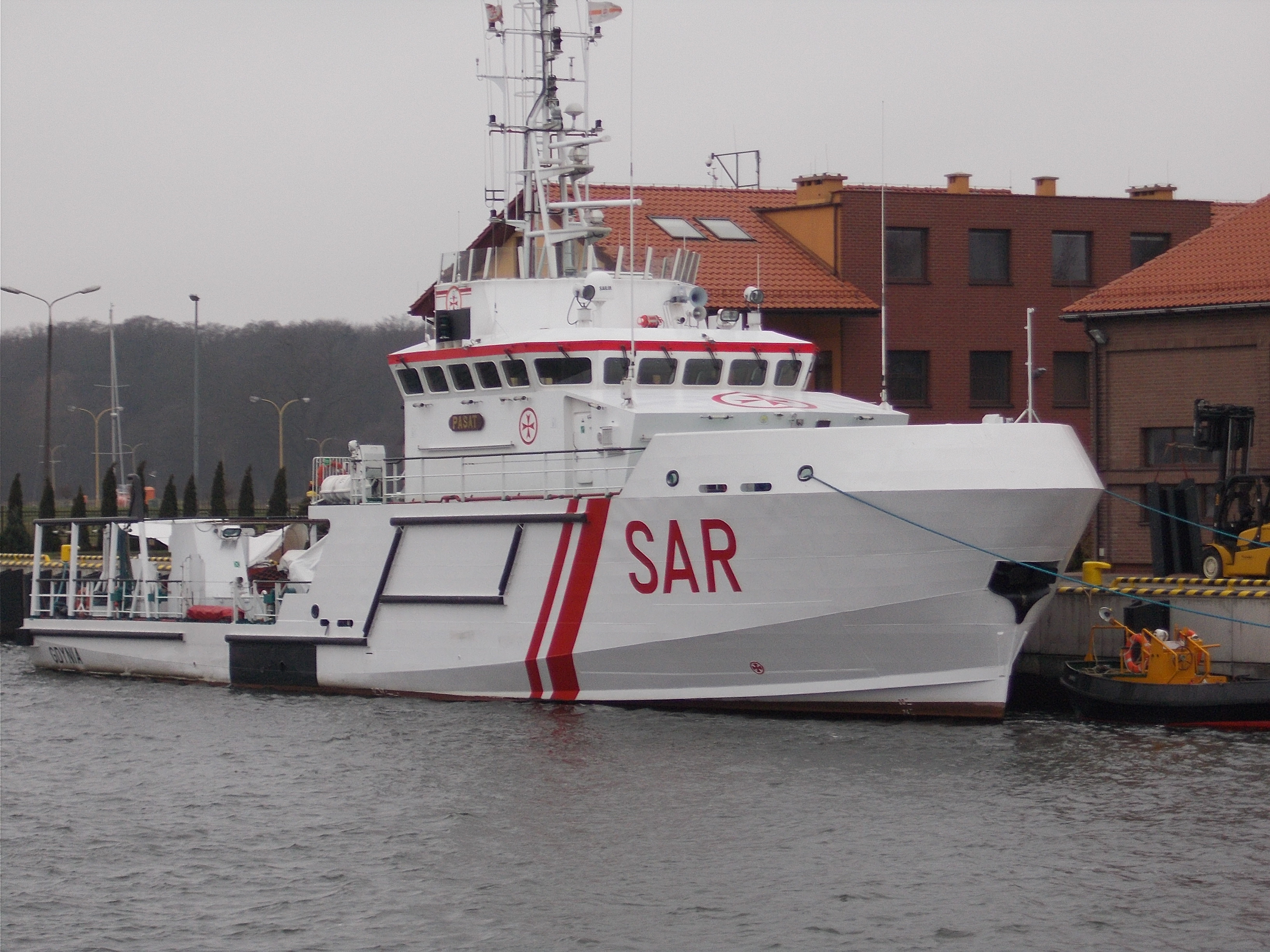 Polish SAR Vessel Pasat in Swinoujscie.